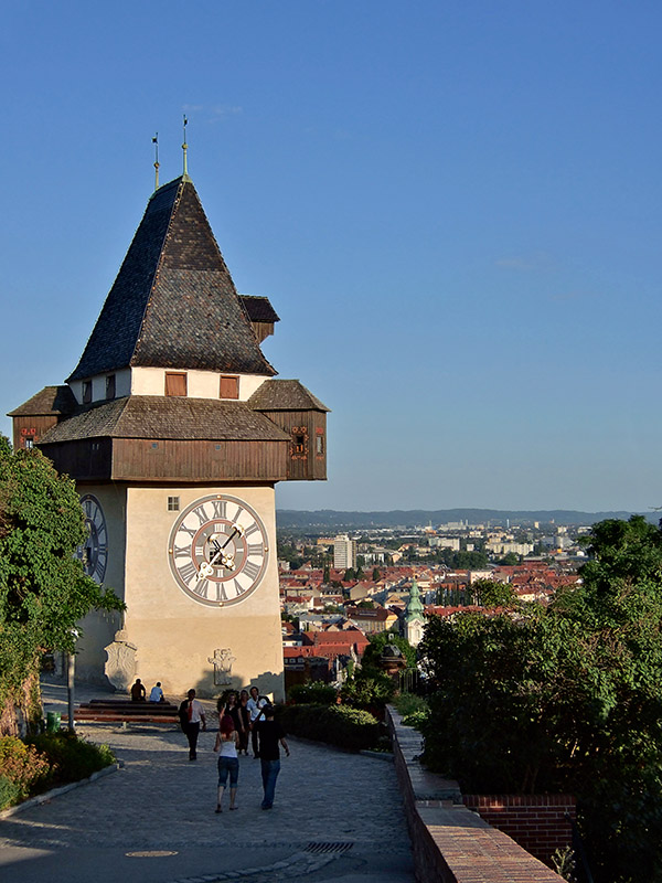 Uhrturm und Blick auf Graz